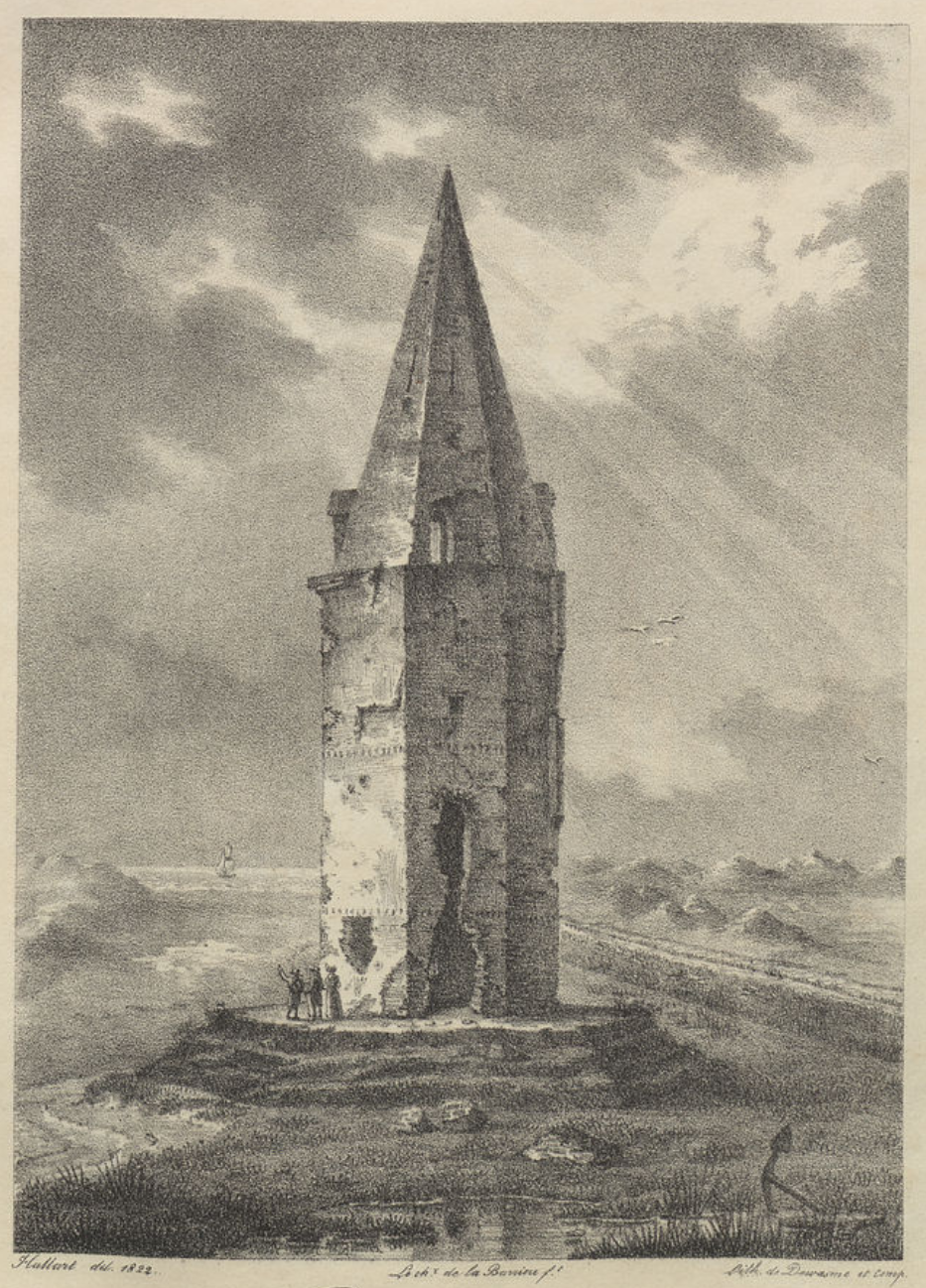 Vuurtoren Nieuwpoort (1822). Steenafdruk door Prosper de la Barrière naar een tekening van Hallart